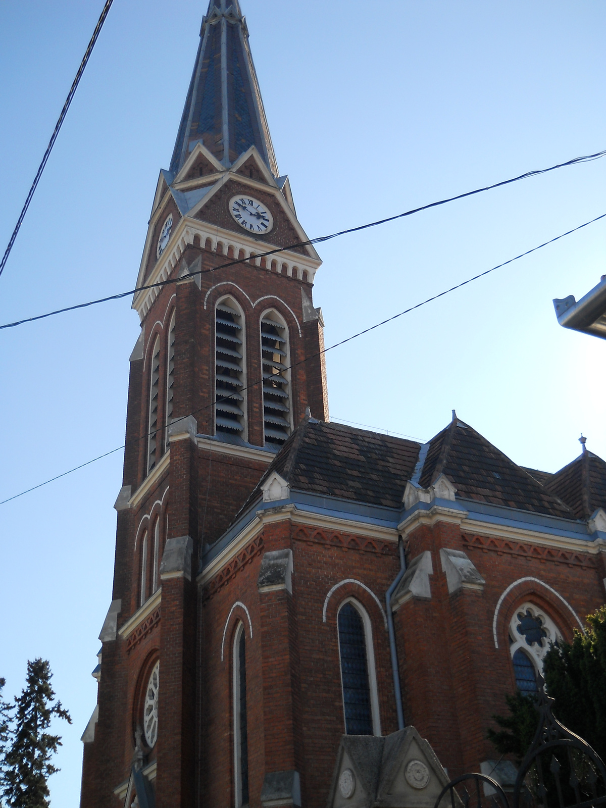 Ev. templom (Körmend, Thököly Imre utca 21.)